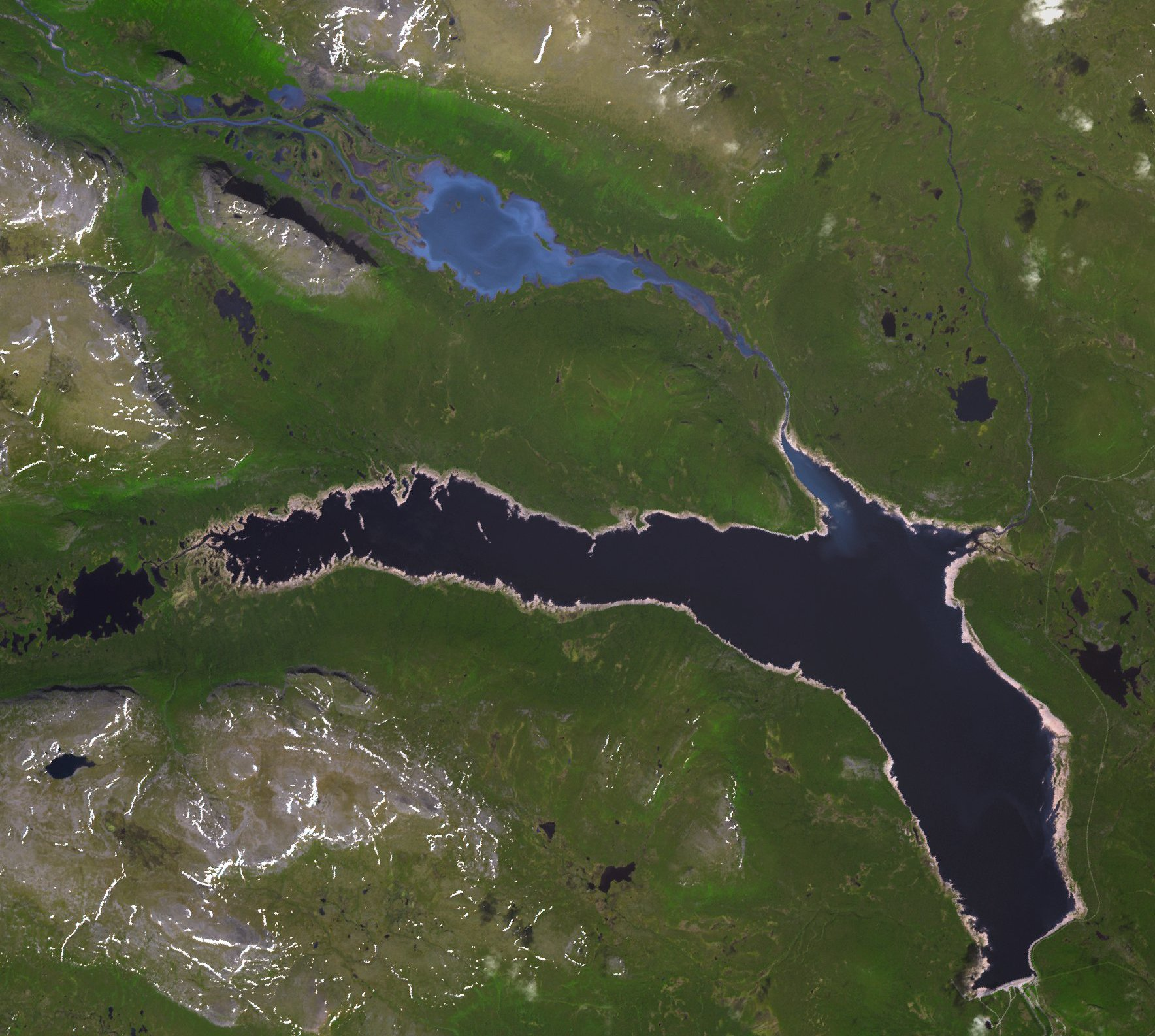 Delta de la Rapaätno qui se jette dans le Laitaure (parc national de Sarek), puis dans le Tjaktjajaure, en Botnie du Nord (Norbotten), Suède. Photo prise le 28 juin 2010.